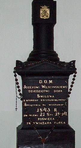 Pomnik posła na Sejm Wielki Józefa Wiercińskiego Przybysławice